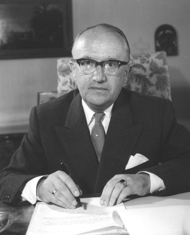 Portraits von Staatssekretär Hallstein